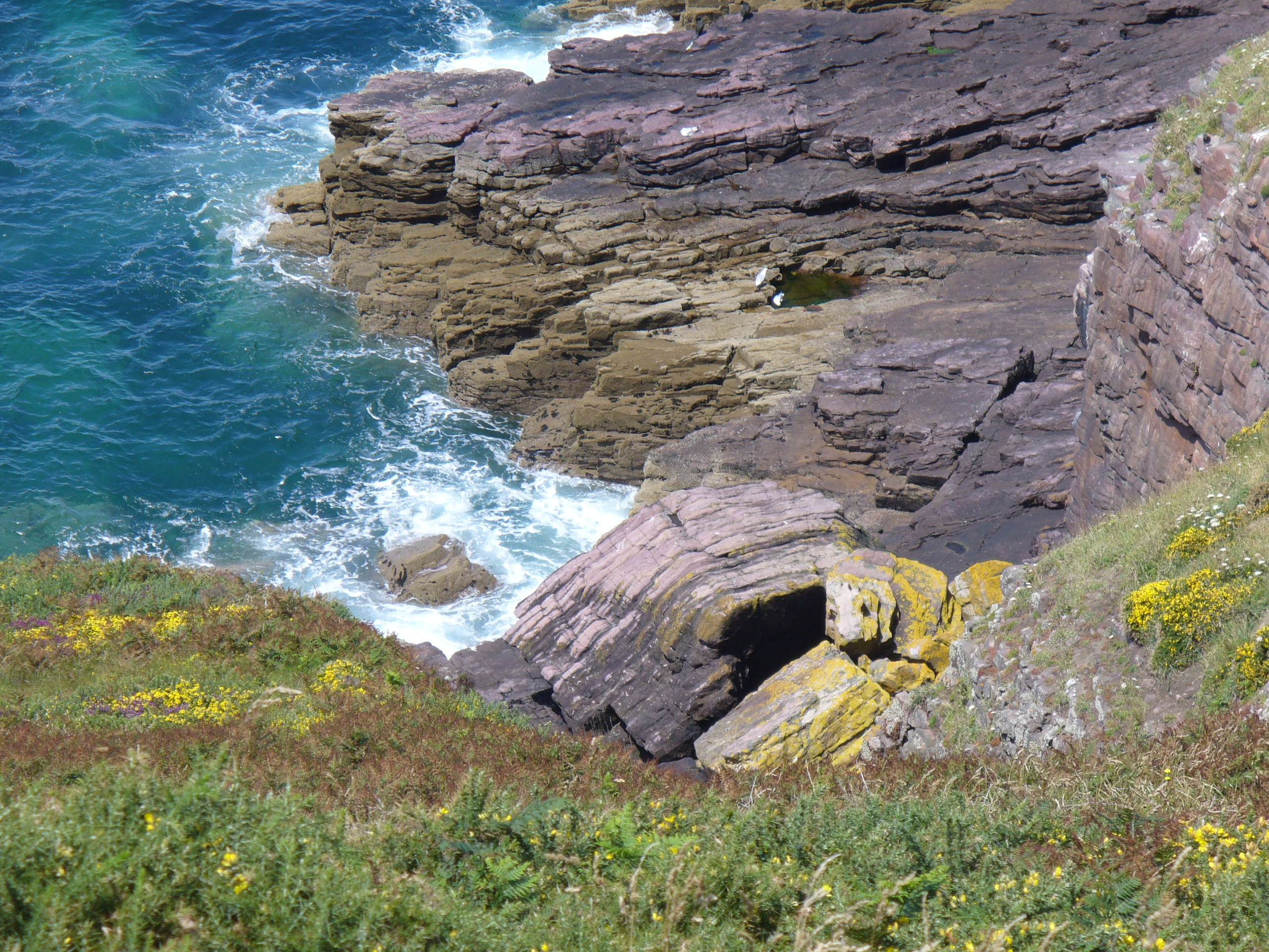 Cap Frehel-Über 70m ragt das Cap Frehel aus dem Meer empor-Cote de Emeraude-Village Plevenon